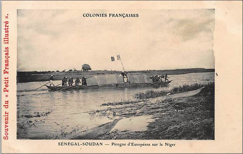 Carte postale, Souvenir du petit français illustré, pirogues d'Européens sur le Niger